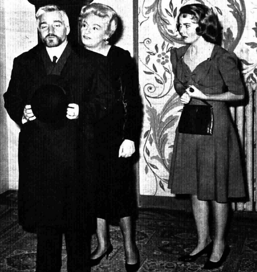 Italian actors Carlo Croccolo, Evi Maltagliati, Emma Danieli on stage